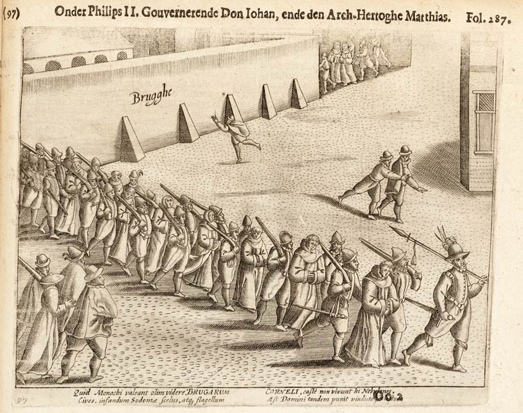 Een groep homoseksuele monniken wordt bij de stadsmuur van Brugge door soldaten afgevoerd.